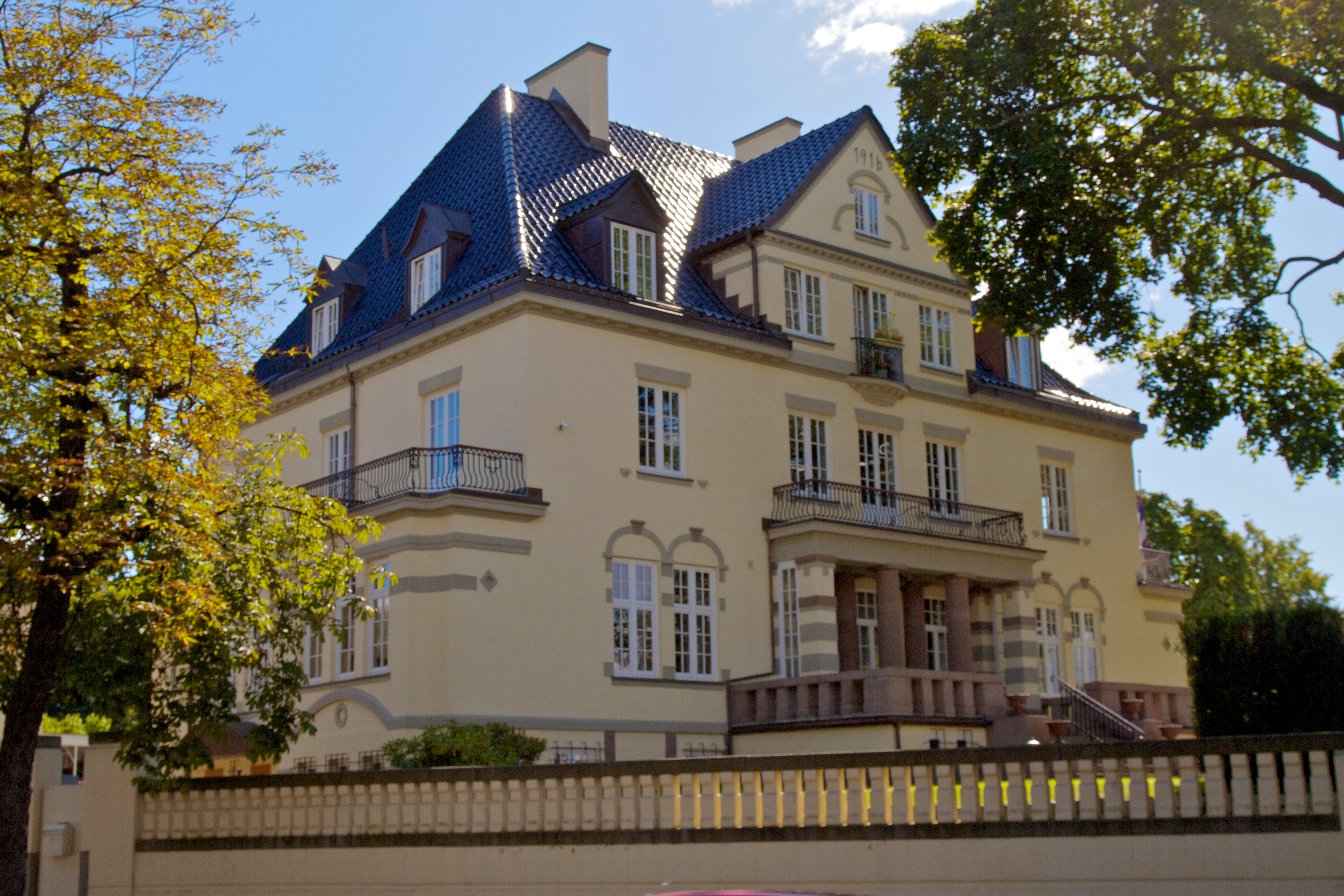 Polens ambassade i Oslo.